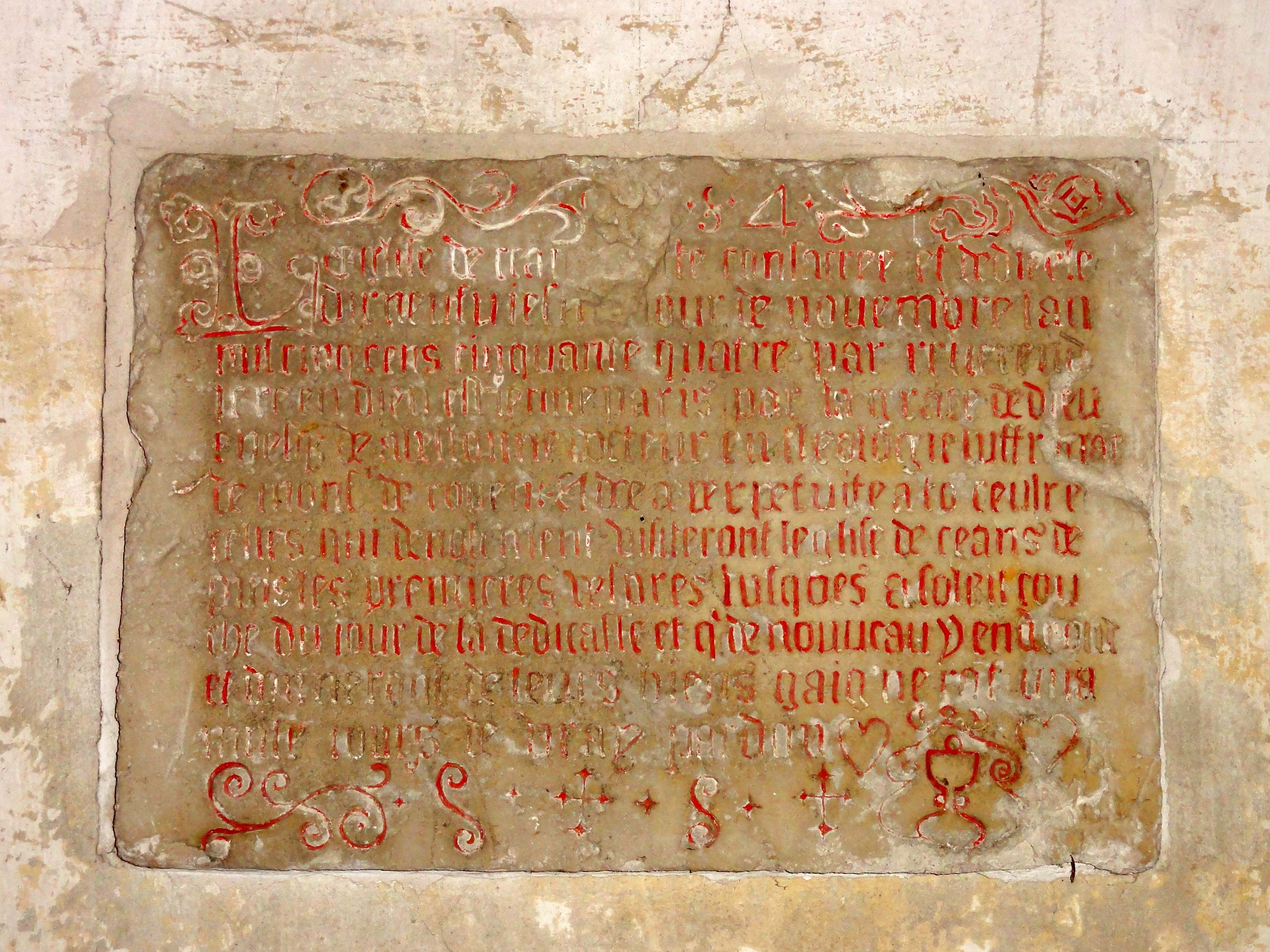 Nef, plaque commémorative de la consécration en 1554, au revers de la façade.